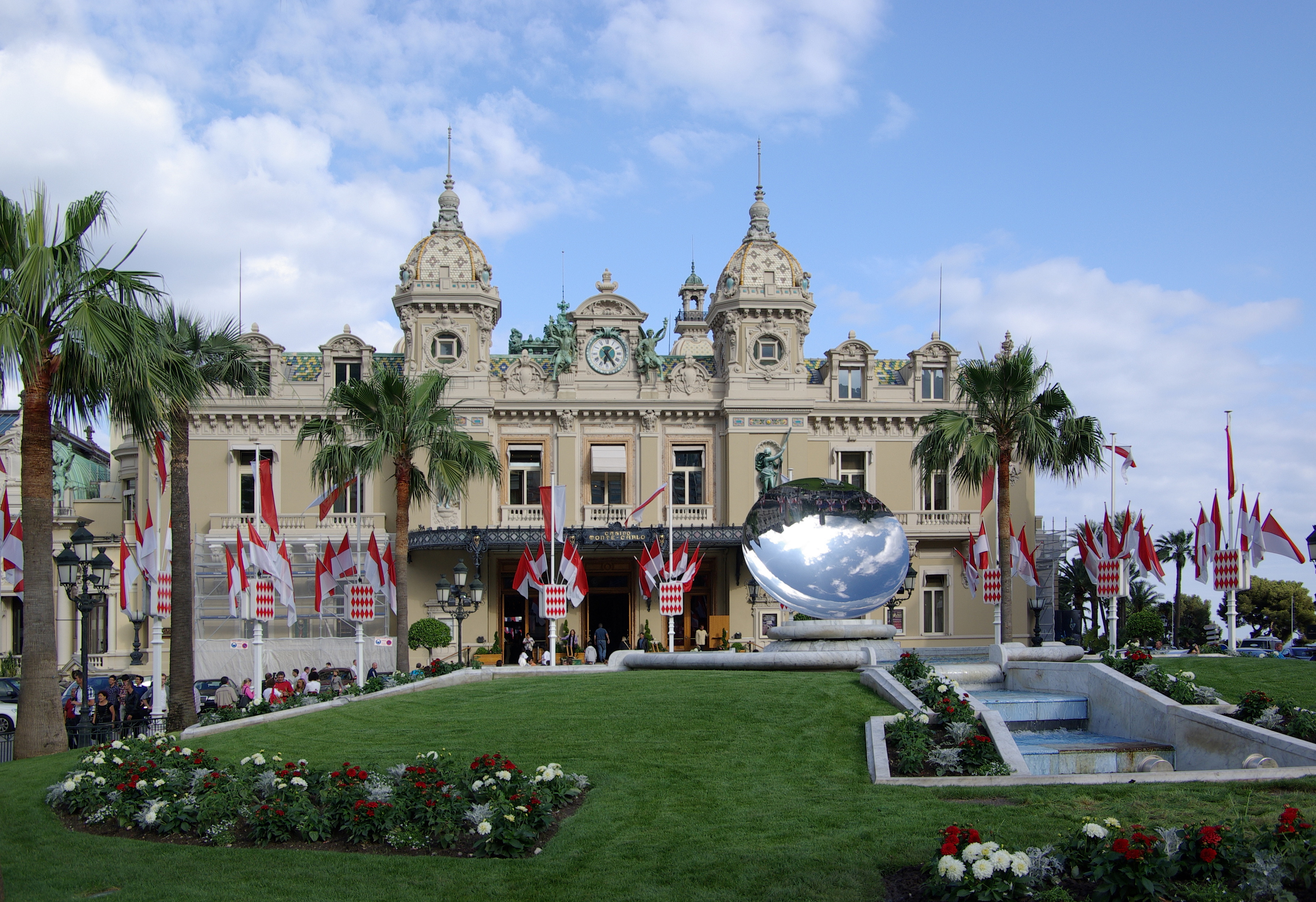 Monaco, Monte-Carlo, Casino